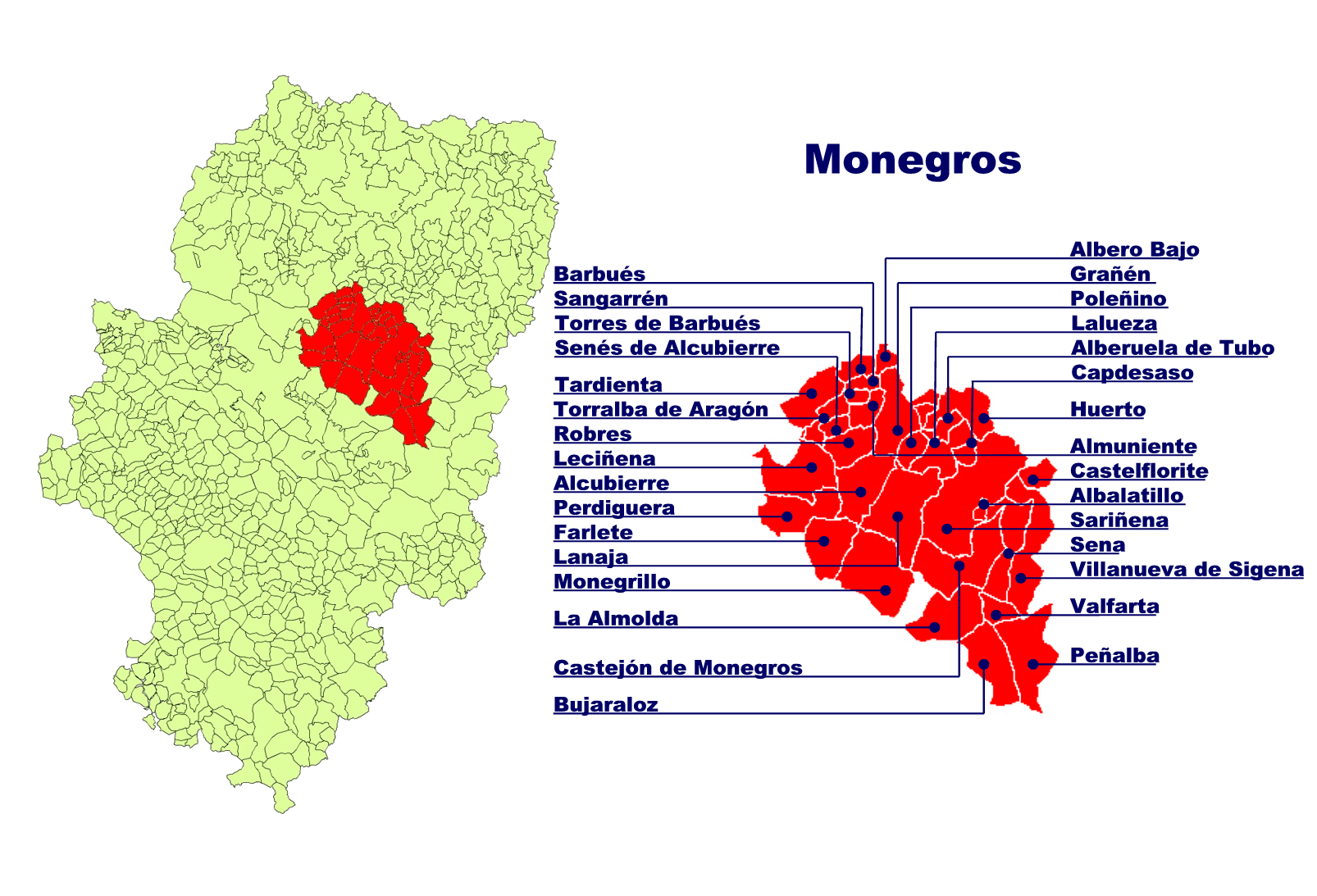 Comarca de Monegros